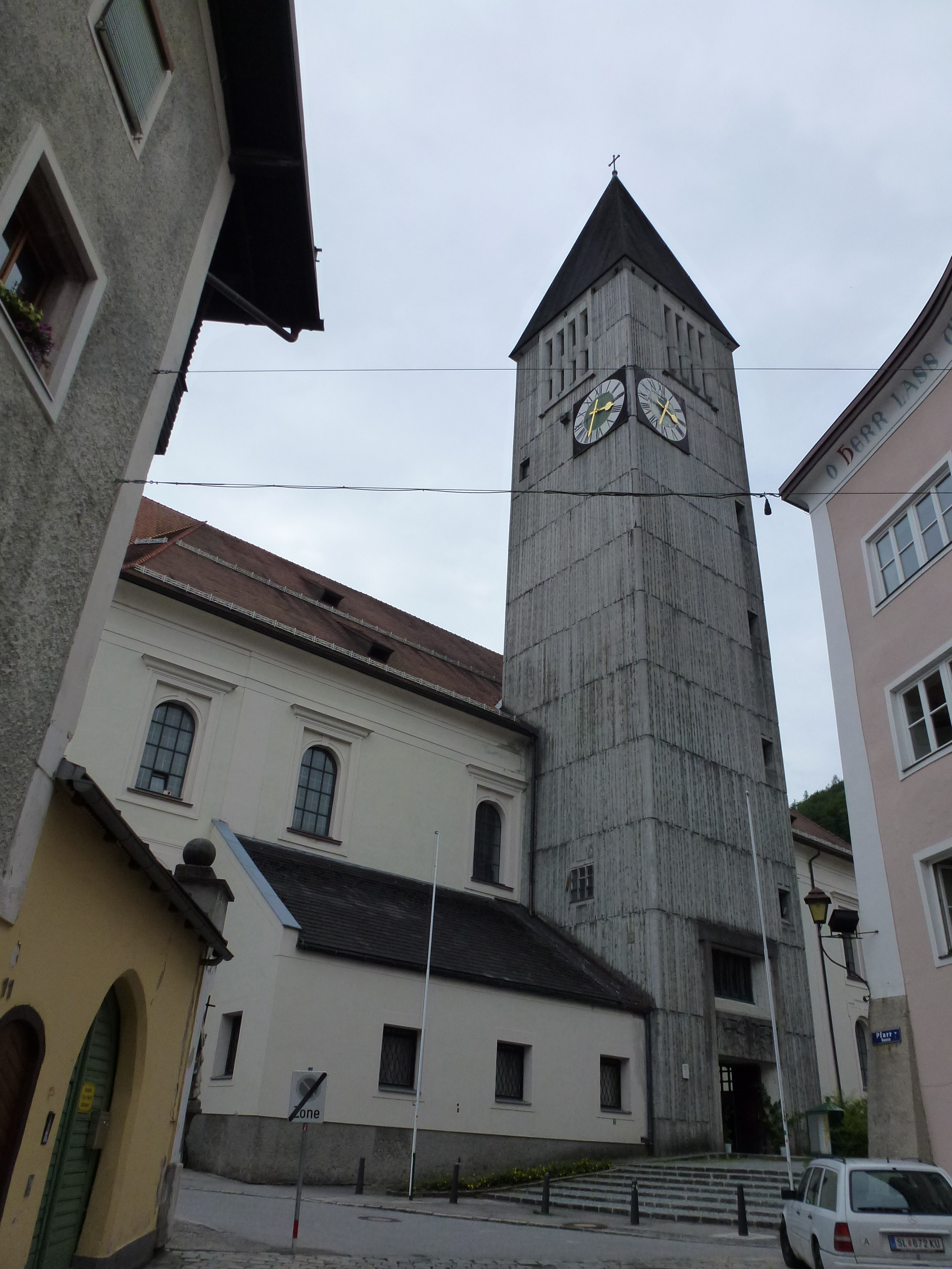 Stadtpfarrkirche St. Anton - Gruberplatz, Hallein